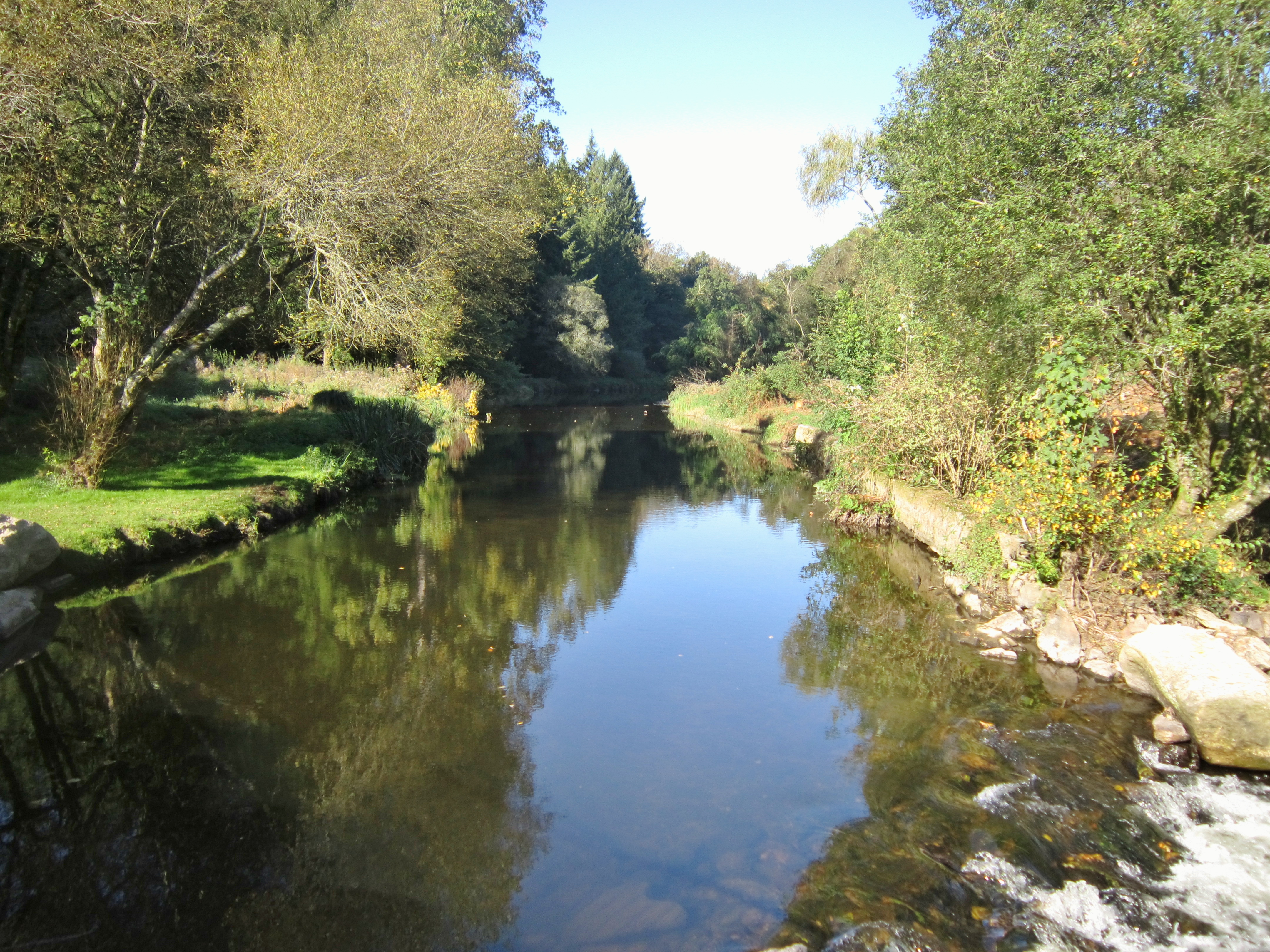 L'Isole juste en amont du Moulin Blanc (situé en Mellac).